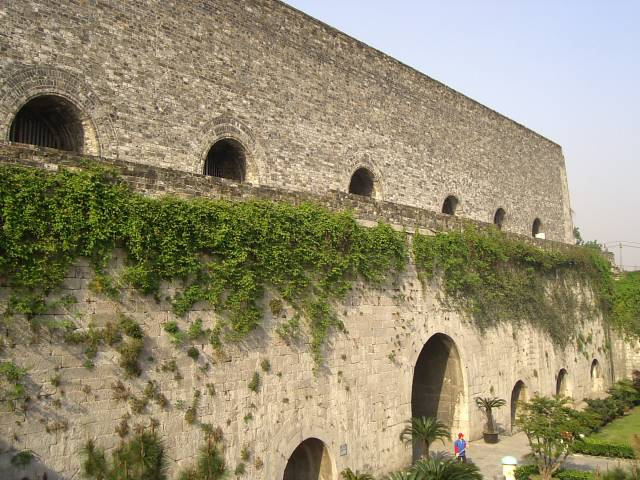 中華門藏兵洞 2004年5月4日撮影 撮影者：権作 参照：